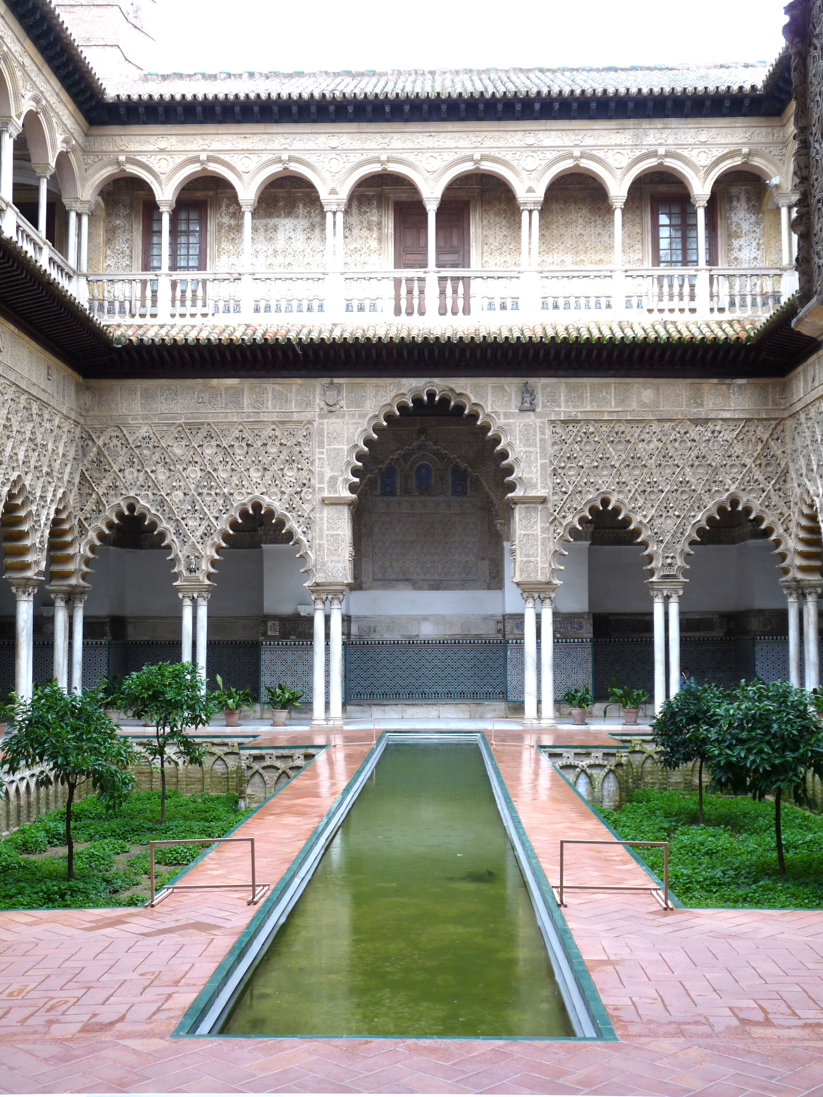 Seville Alcazar 09